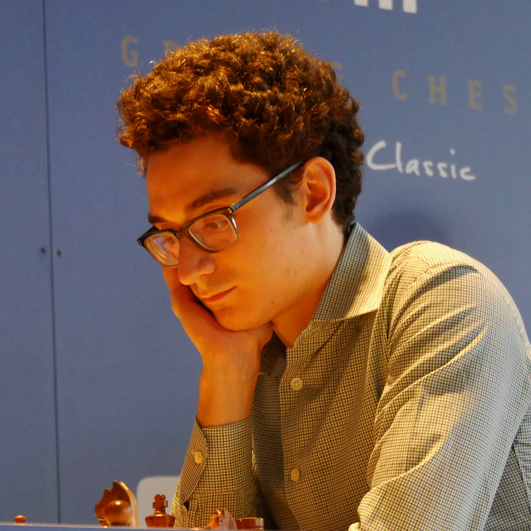 Fabiano Caruana, Grenke Chess Classic 2018 in Karlsruhe.